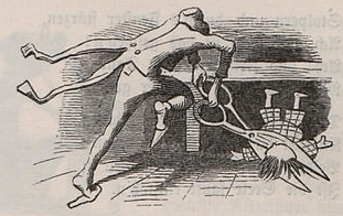 Fliegende Blätter, Band 33, Seite 109, Bild 3